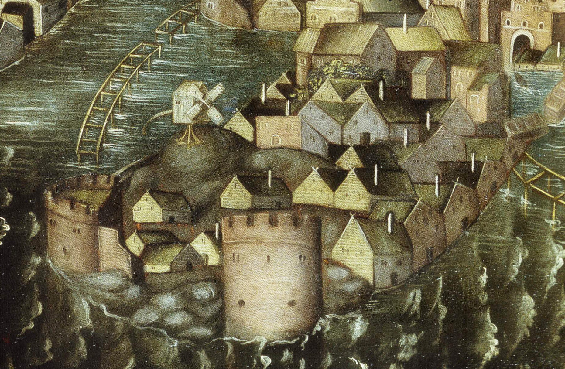 Helgeandshusets kvarn på Vädersolstavlan 1535